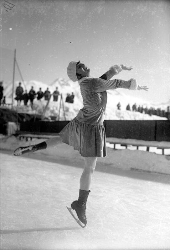 Elli Winter, die frühere mehrfache deutsche Meisterin im Eiskunstlauf, ist an den Folgen einer Operation gestorben ! Frl. Elli Winter, welche ausser vielen internationalen Erfolgen, auch die damalige Weltmeisterin Frau Jaros-Szabo im Paarlaufen mit ihrer Schwester besiegen konnte, bei einer ihrer graziösen Vorführungen auf dem Eise.